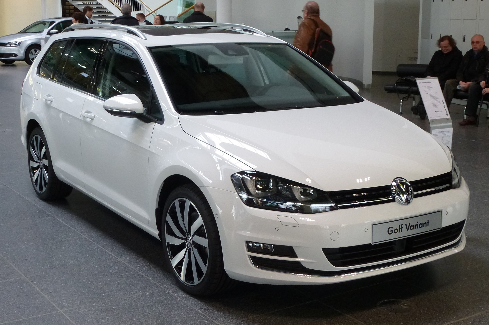 VW Golf VII Variant